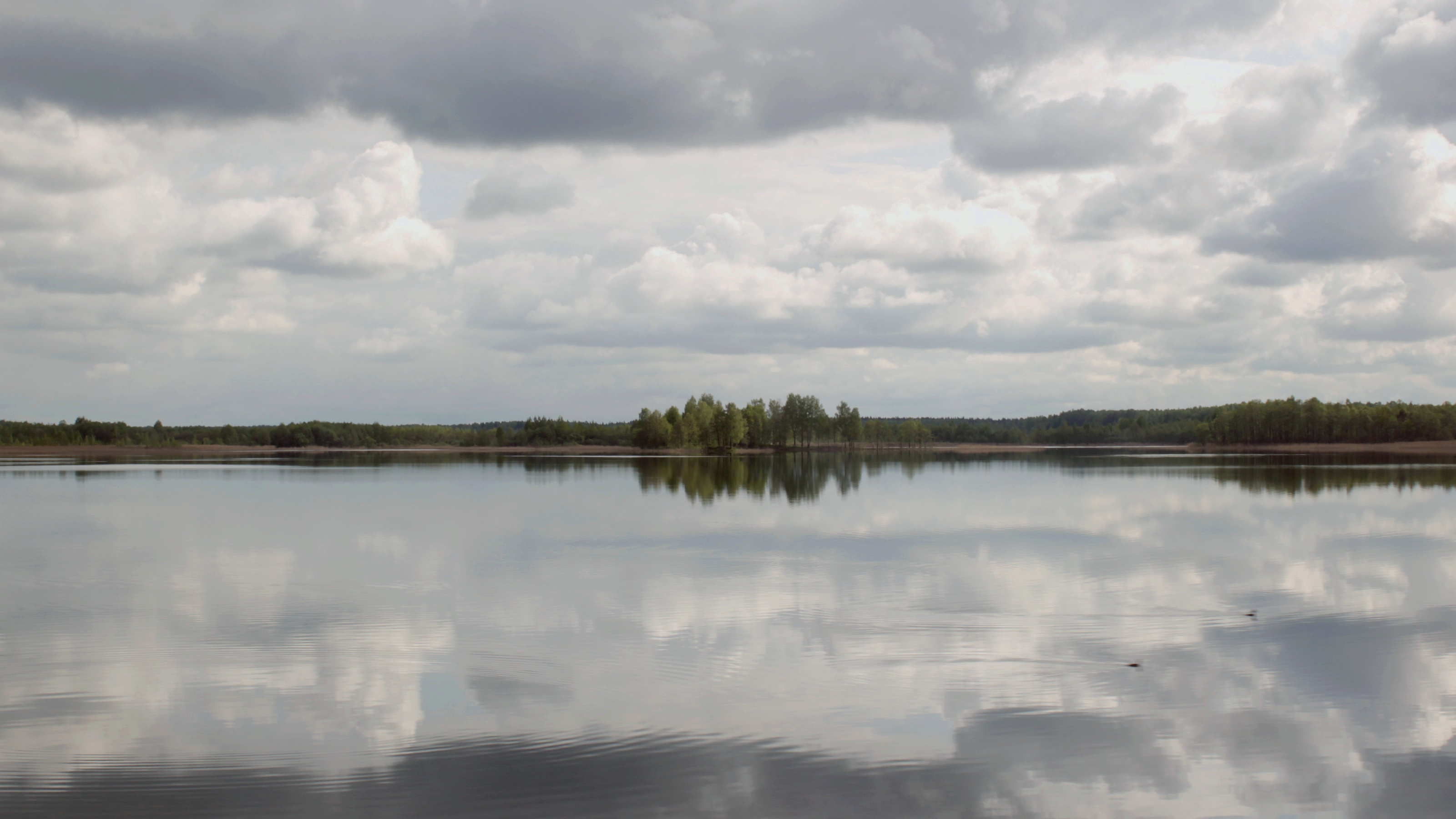 Озеро Сосна. Витебский район. Вид на остров из посёлка Должа.